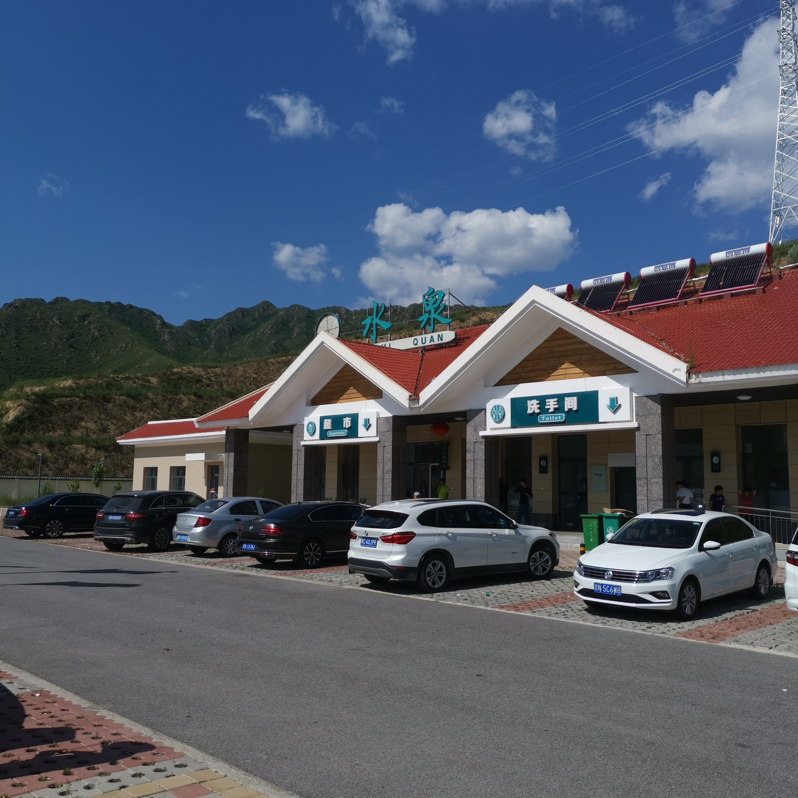 中文（中国大陆）: 张承高速水泉服务区